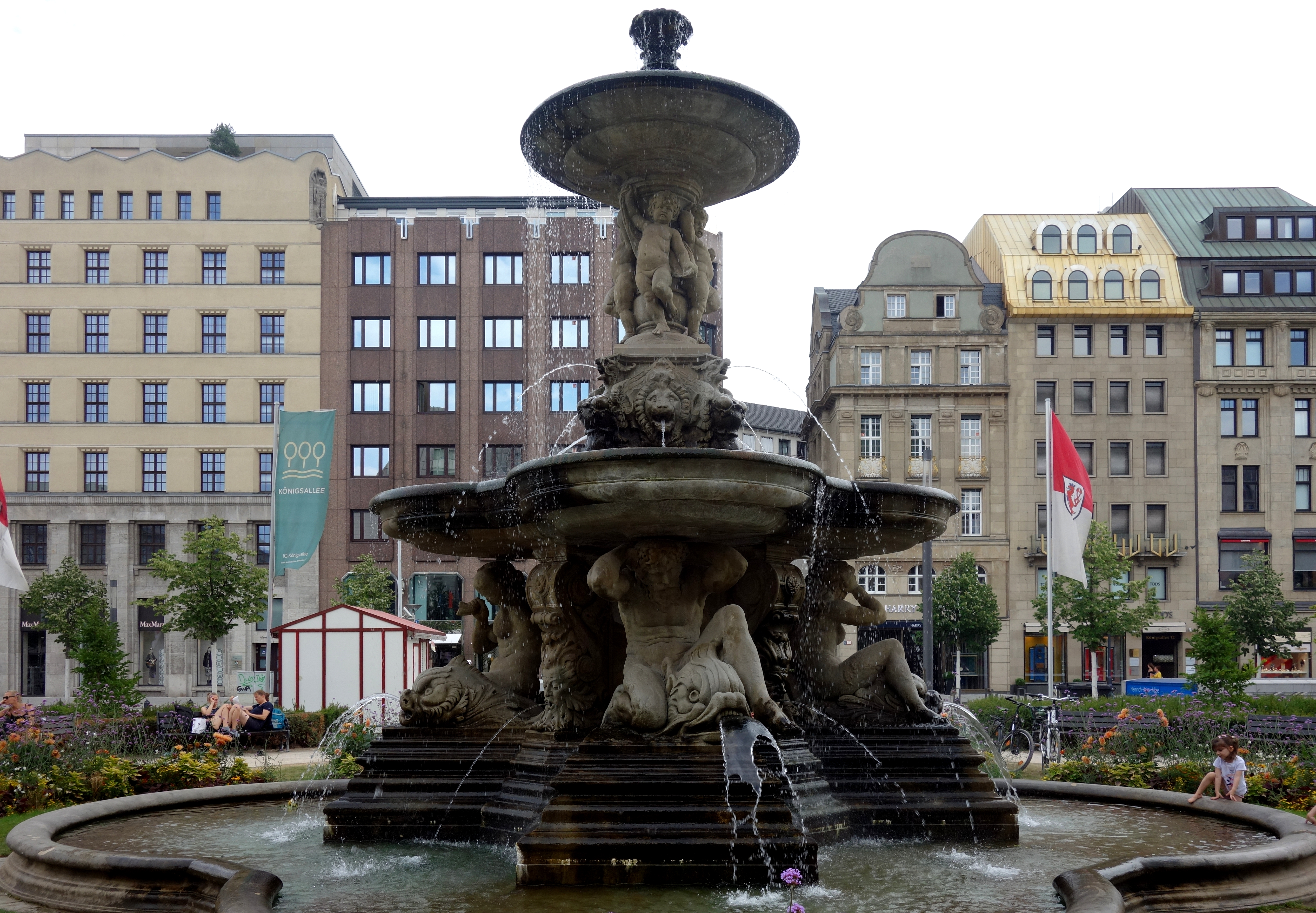 Corneliusbrunnen in Düsseldorf